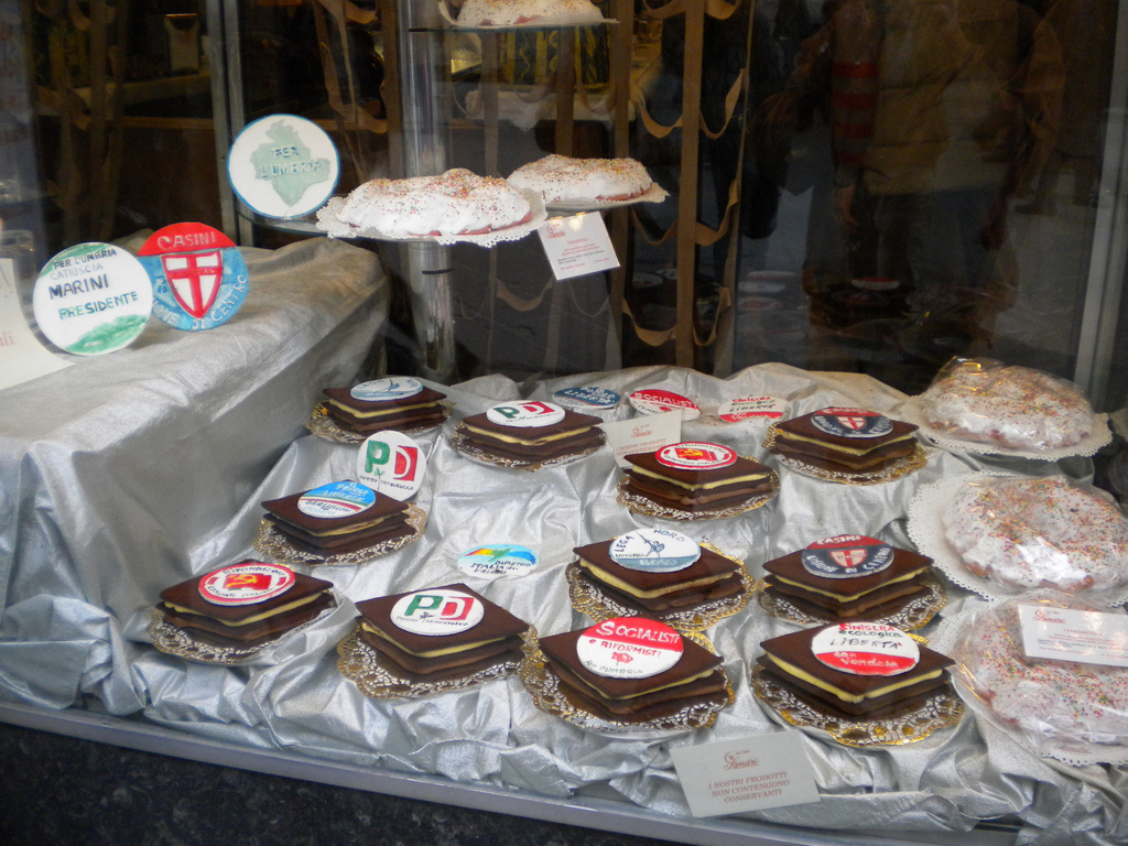 La vetrina dell'antica Pasticceria Sandri di Perugia racconta puntualmente tutti i momenti d'attualità, anche politica. Ogni Sachertorte rappresenta una delle formazioni in lizza per le elezioni regionali 2010 in Umbria.